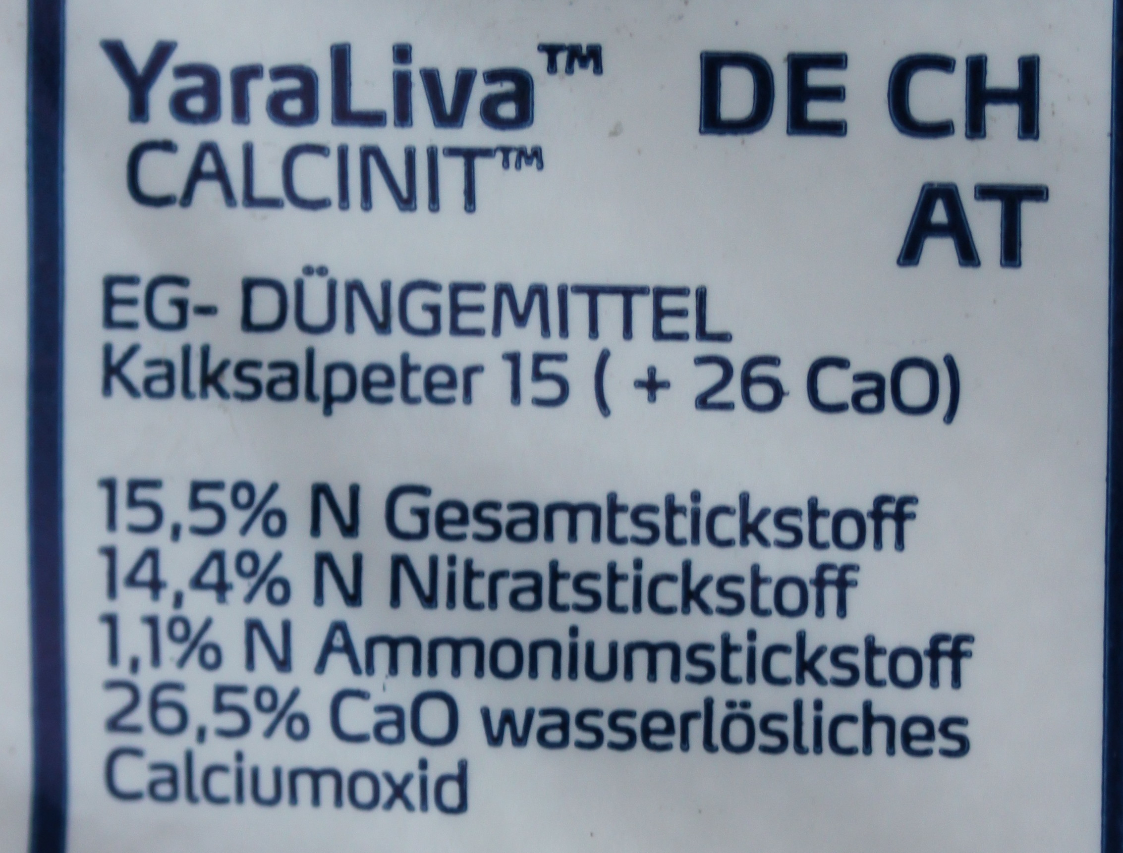 Beschriftung auf einem Sack Kalksalpeter 15 (+26 CaO)